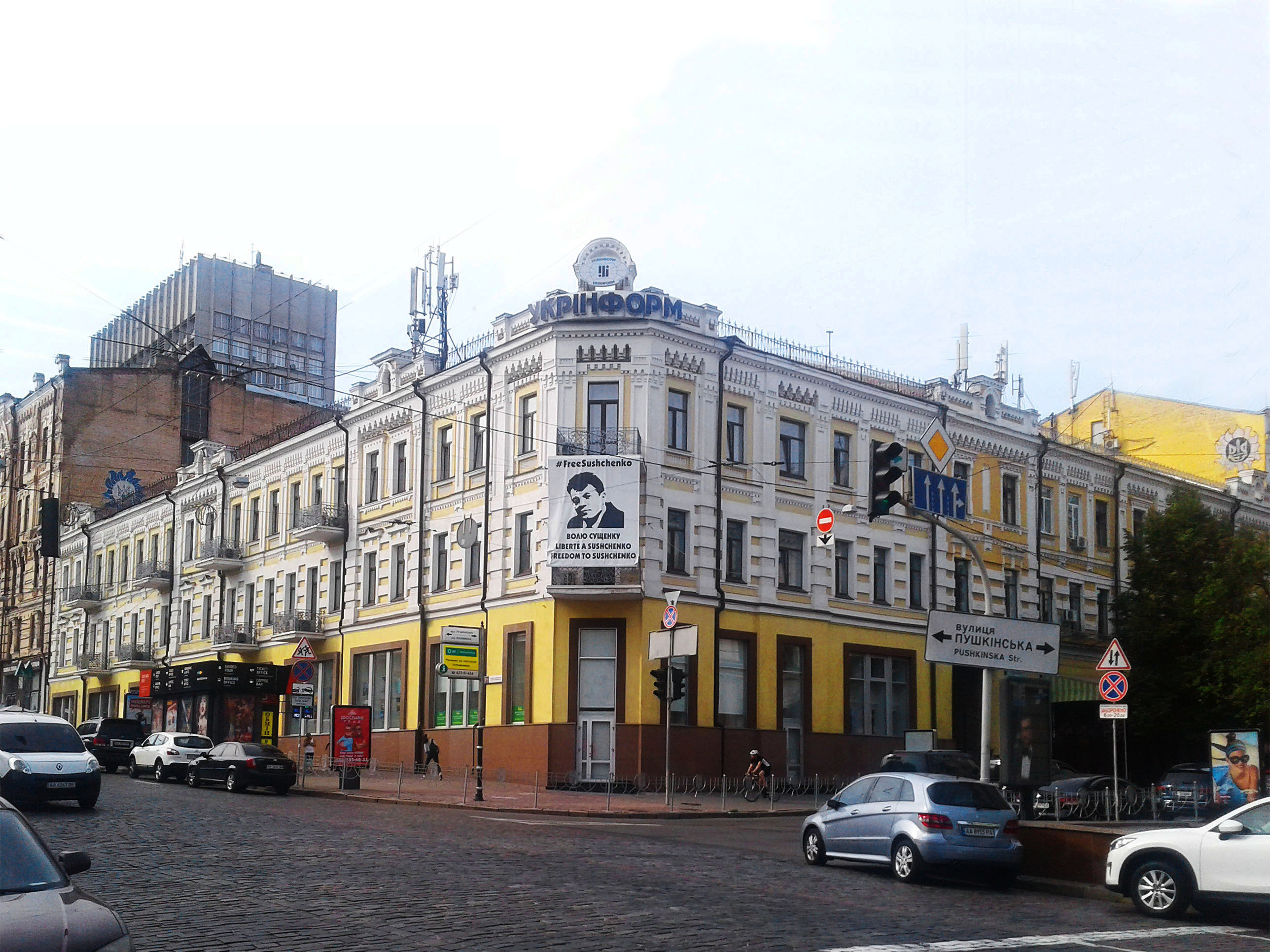 Надпис "Волю Сущенку" на будівлі Українського національного інформаційного агентства. Сущенко Роман Володимирович — український журналіст, спецкор Національного інформагентства «Укрінформ», переслідуваний в РФ